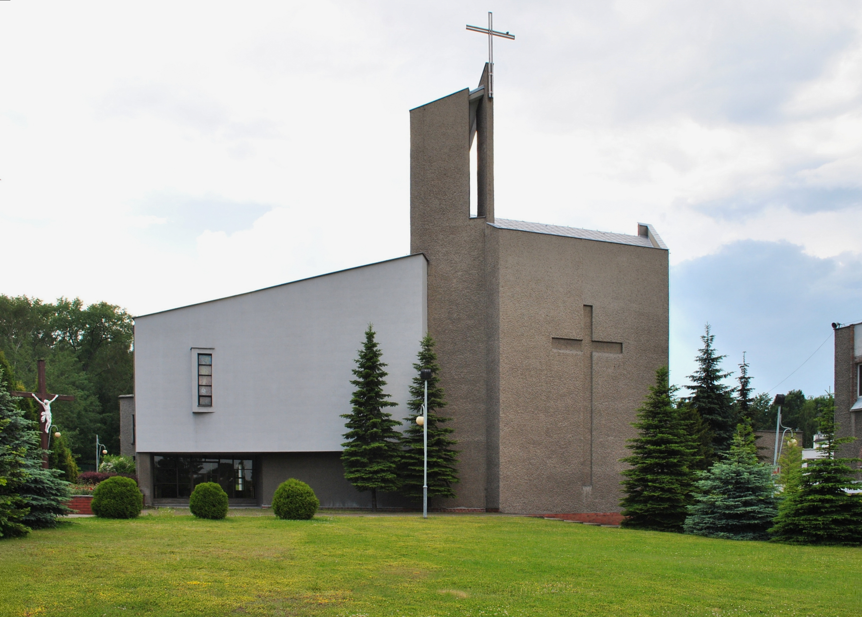 Katowice - Osiedle Witosa. Kościół parafialny parafii Podwyższenia Krzyża Świętego i św. Herberta